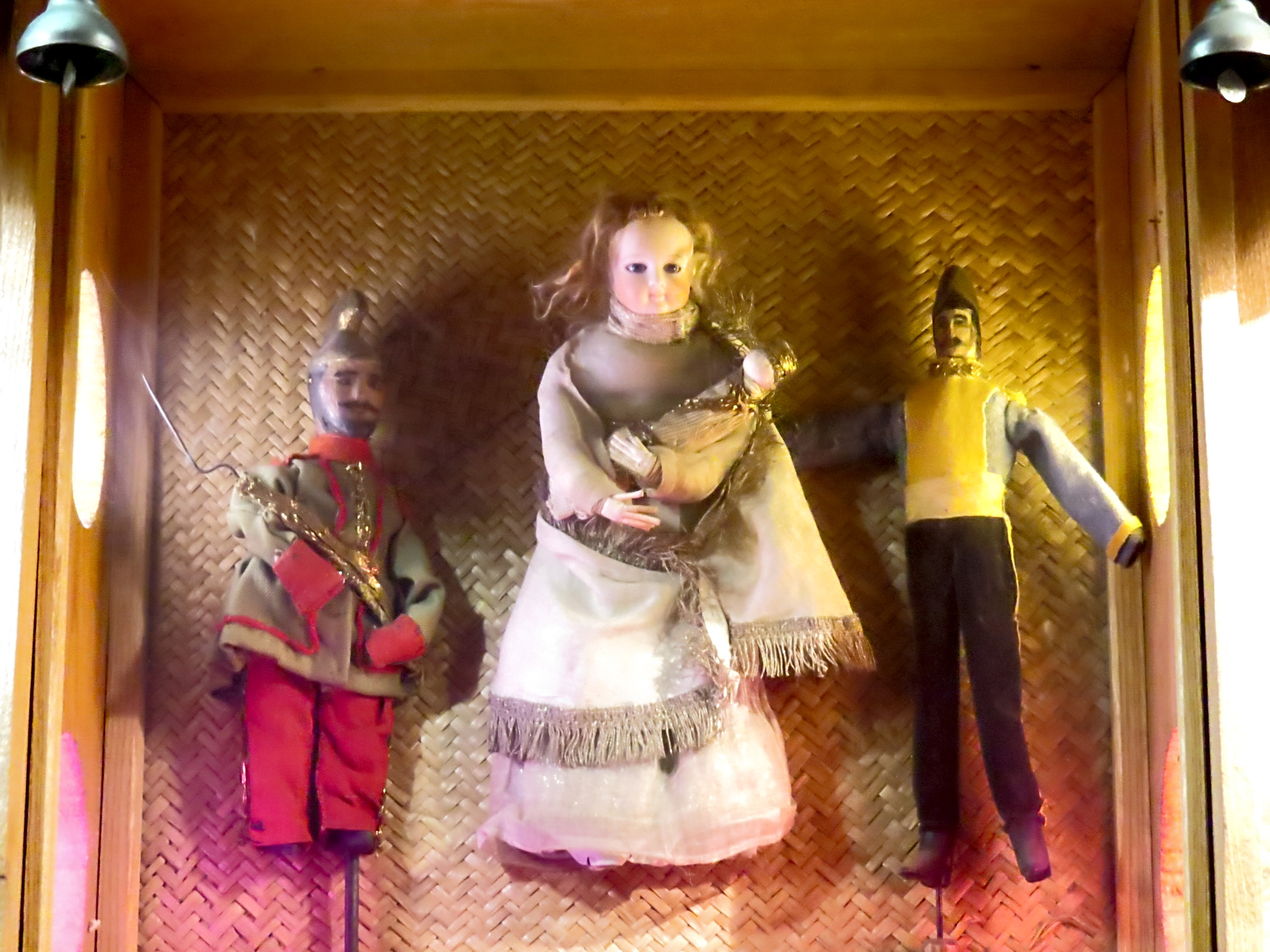 Експозиція Київського музею театрального, музичного та кіномистецтва України. Вертепні ляльки. Порцеляновий оригінал XVIII ст. (в центрі) та копії.